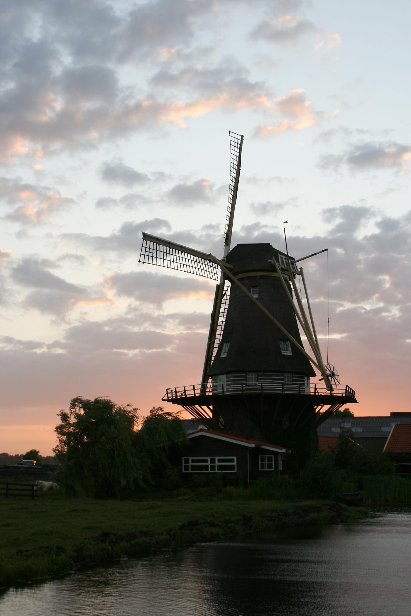 Aarlanderveen: molen De Morgenster in de avondschemering